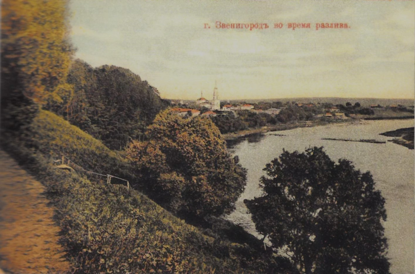 Zvenigorod during time high water Звенигород во время разлива